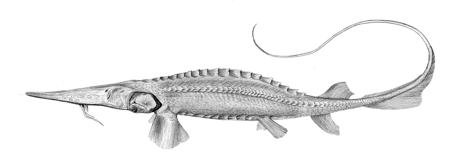 Pseudoscaphirhynchus fedtschenkoi